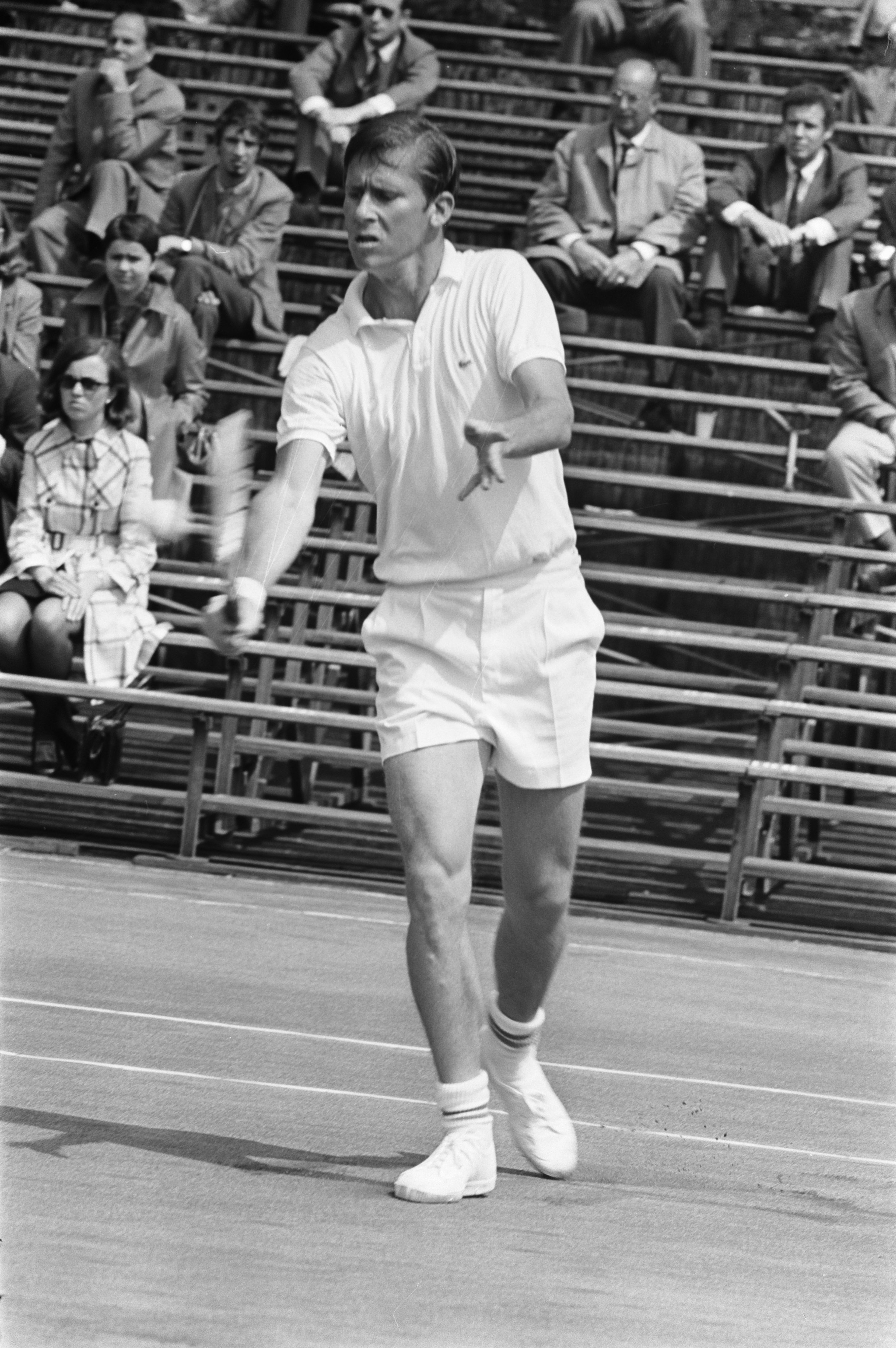 Collectie / Archief : Fotocollectie Anefo Reportage / Serie : [ onbekend ] Beschrijving : Top Tennis Toernooi 1969 in Amsterdam D. Ralston , aktie Datum : 22 mei 1969 Locatie : Amsterdam, Noord-Holland Trefwoorden : TENNIS, toernooien Persoonsnaam : D. Ralston Fotograaf : Evers, Joost / Anefo Auteursrechthebbende : Nationaal Archief Materiaalsoort : Negatief (zwart/wit) Nummer archiefinventaris : bekijk toegang 2.24.01.05 Bestanddeelnummer : 922-4467